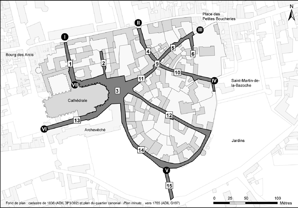 clôture canoniale Saint-Gatien de Tours sur le plan du cadastre de 1836 n°1 rue de la Psalette, n°2 impasse de la justice des eaux, n°3 place Grégoire de Tours, I à VI portails du quartier canoniale Saint-Gatien